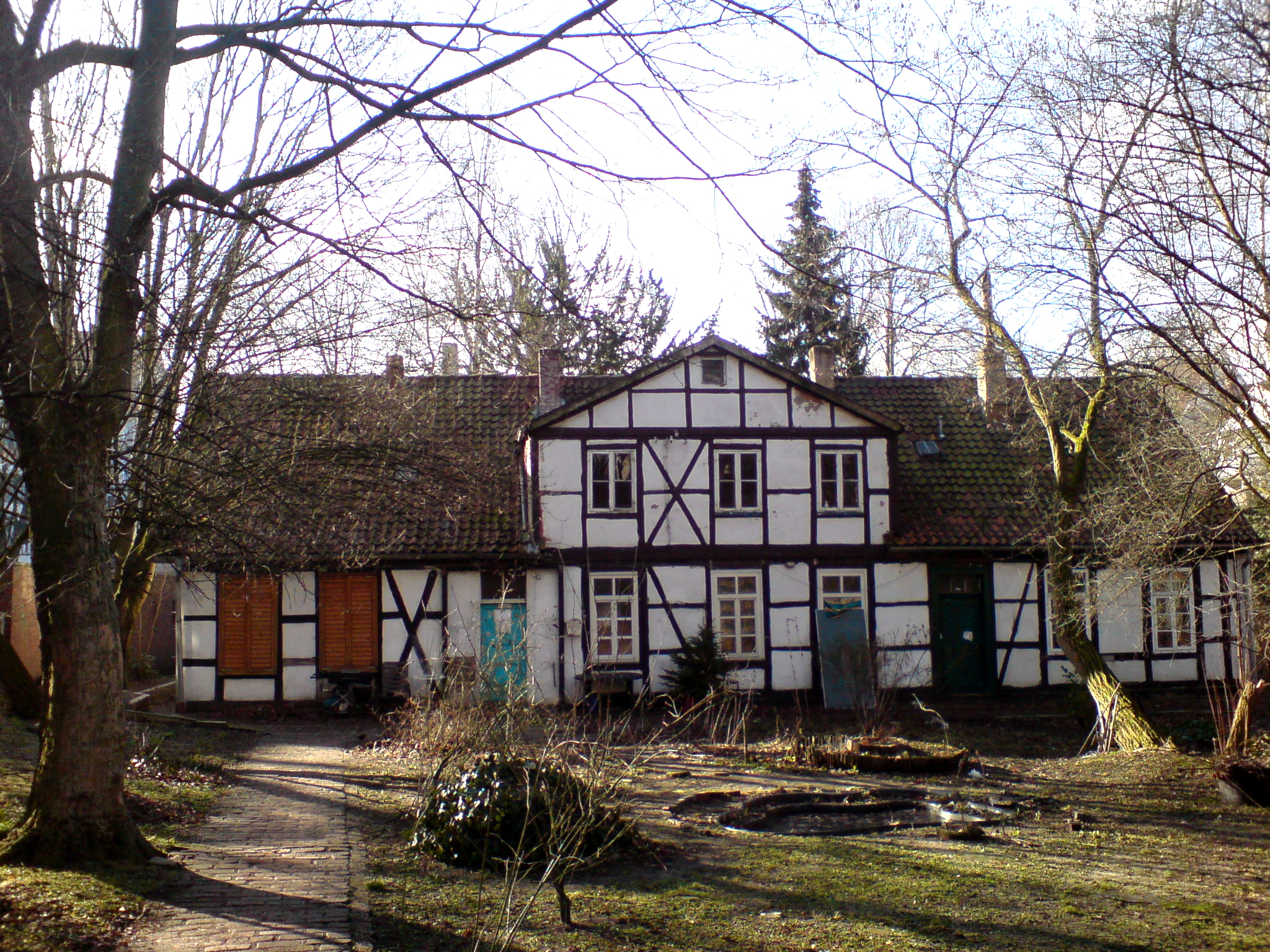 Das Gartenhaus in Hannover, Am Judenkirchhof 11c, als schlichter, klassizistischer Fachwerkbau von 1820. Es ist das letzte Zeugnis der ursprünglich ländlichen Steintorgartengemeinde außerhalb von Festungsring und Stadtmauer und zugleich das älteste Haus der Nordstadt. Der Garten war anfangs ebenfalls symmetrisch angelegt. Später diente es Hannovers ältestem Industriebetrieb, der königlich privilegierten Wachstuchmacherey vor dem Steinthore", heute Benecke-Kaliko. Es liegt auf einer Linie mit dem Welfenschloss, dem Marstall und der Christuskirche und direkt gegenüber dem Alten Jüdische Friedhof.